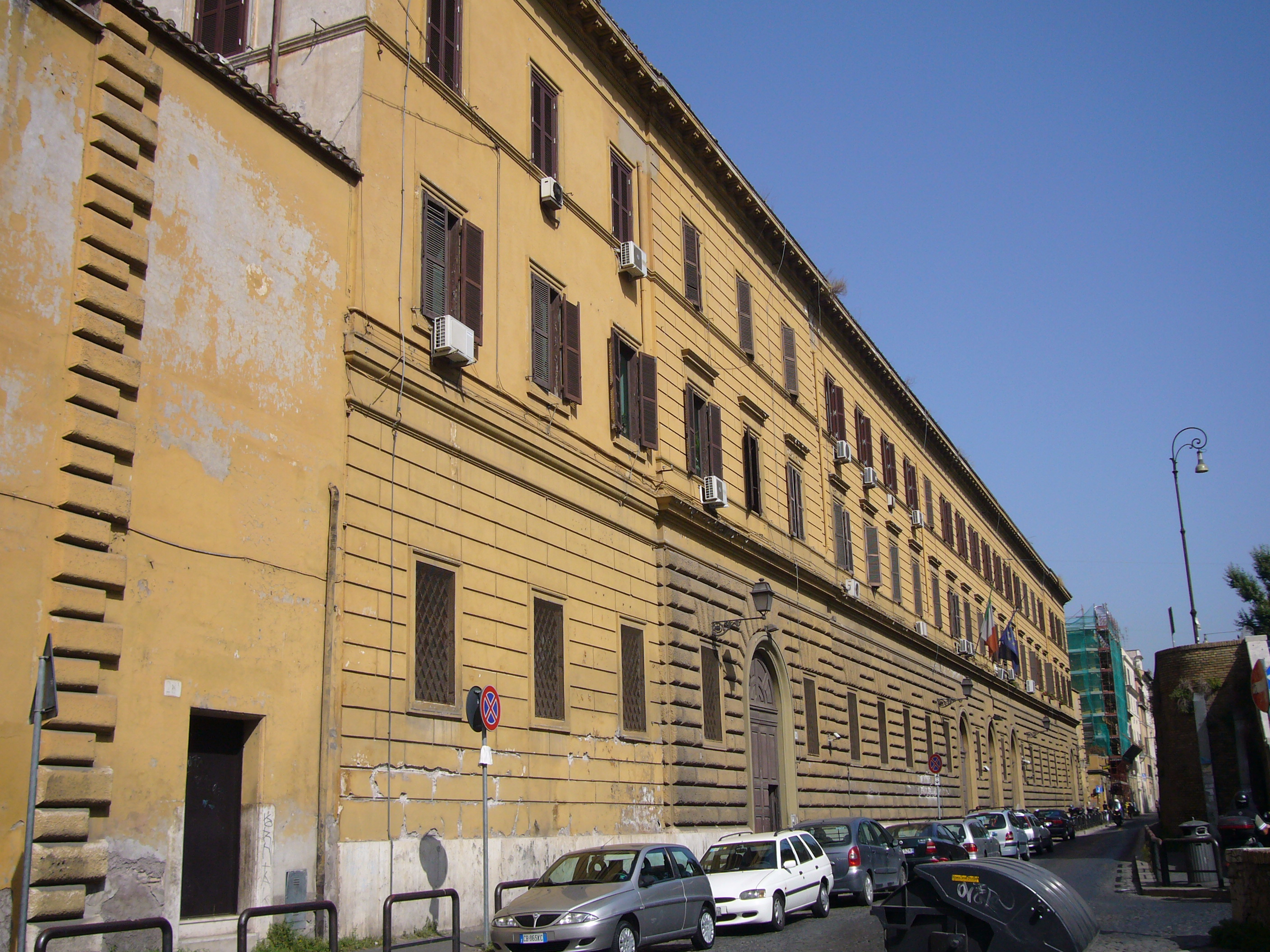 Roma, facciata del carcere di Regina Coeli su via della Lungara, 29